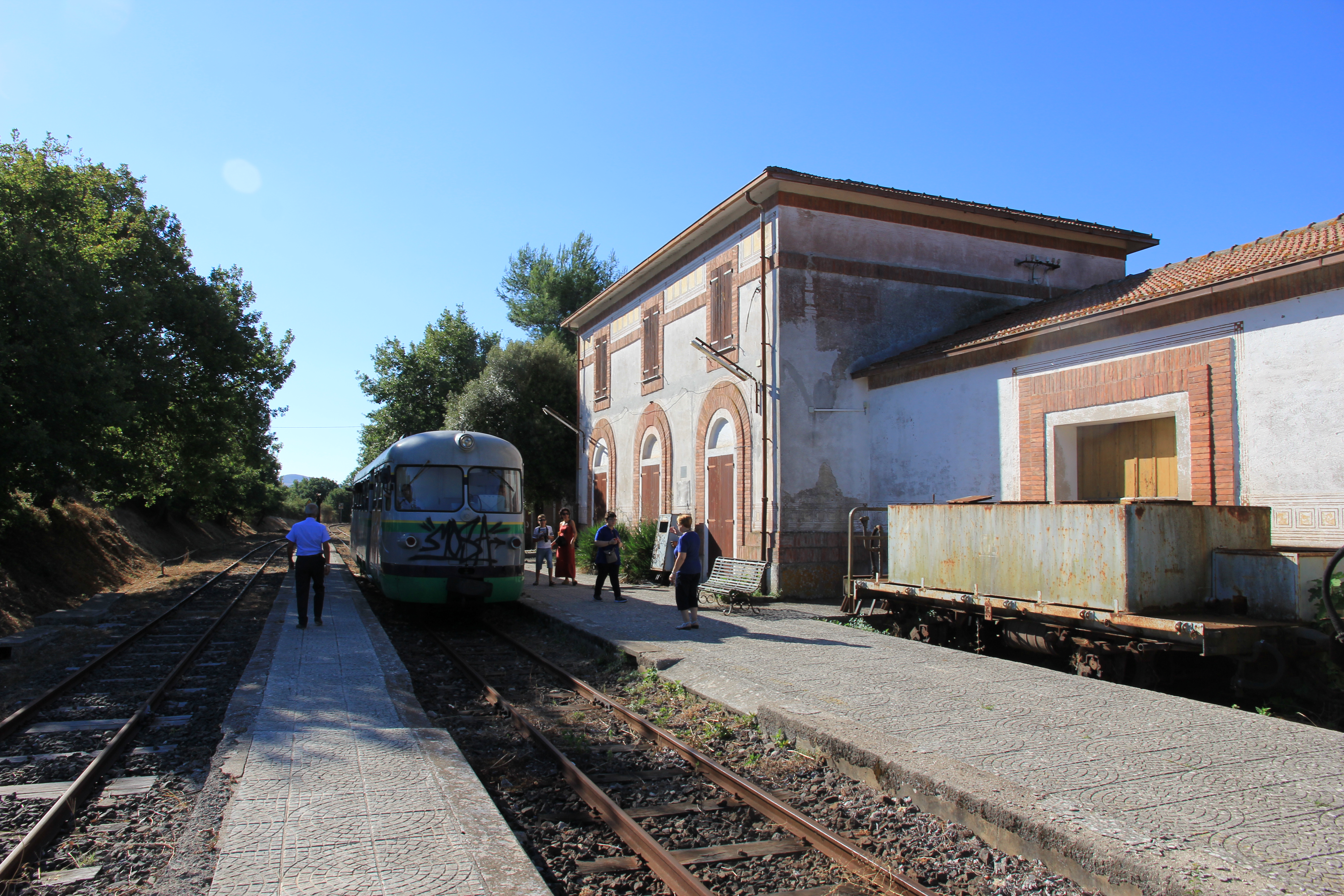 Osilo - Stazione ferroviaria